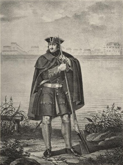 Фузелео Л.-Гв. Преображенского полка, с 1700 по 1720 год. Вид изображает мазанковое строение на берегу реки Невы, на месте нынешней Дворцовой набережной в С.П-бург в том виде, как оно было в первые годы существования сего города.